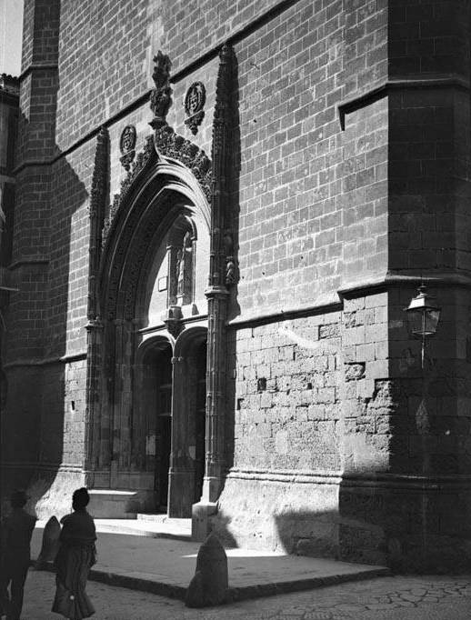 Imatge